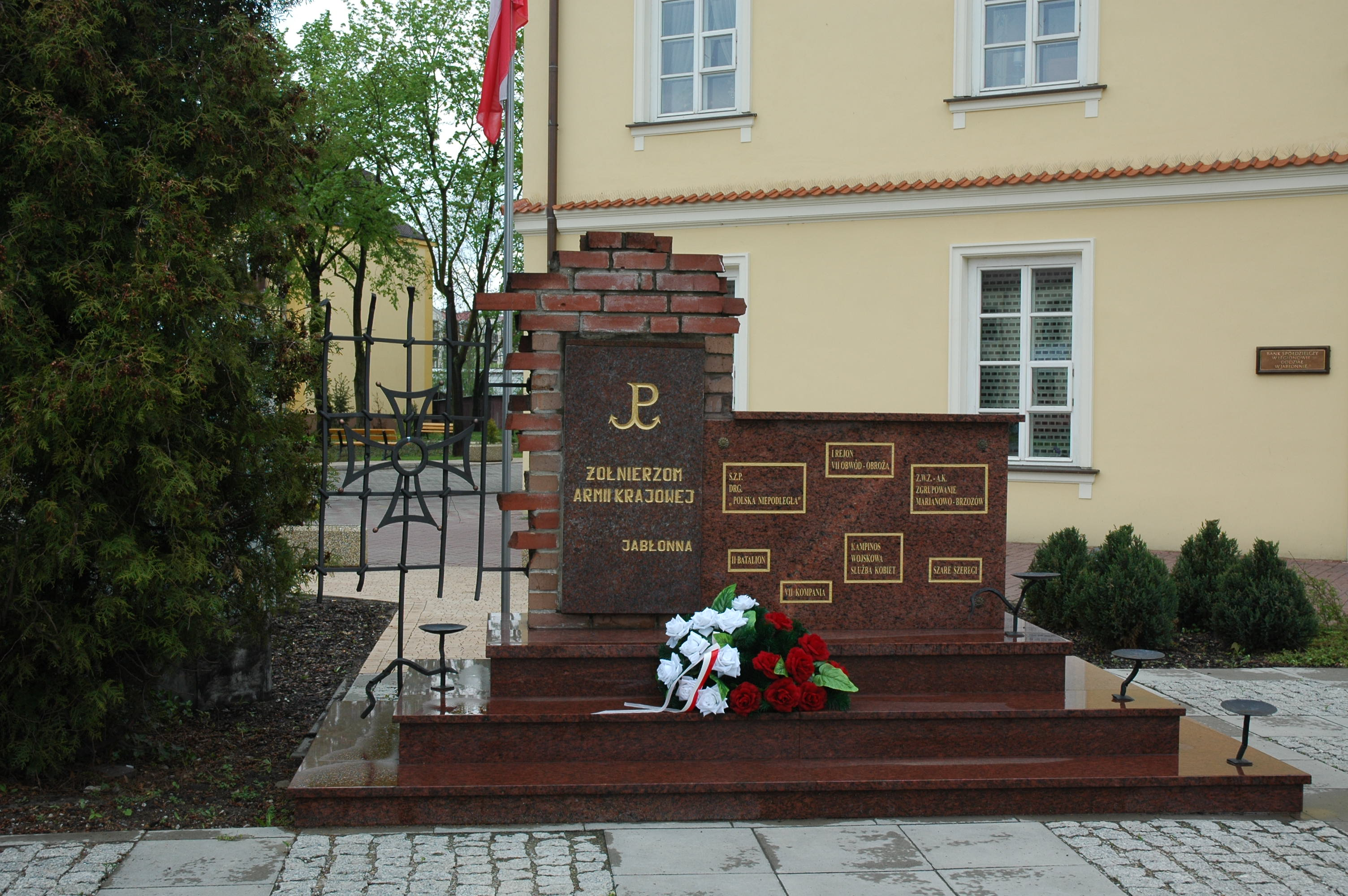 Jabłonna - Pomnik Armii Krajowej